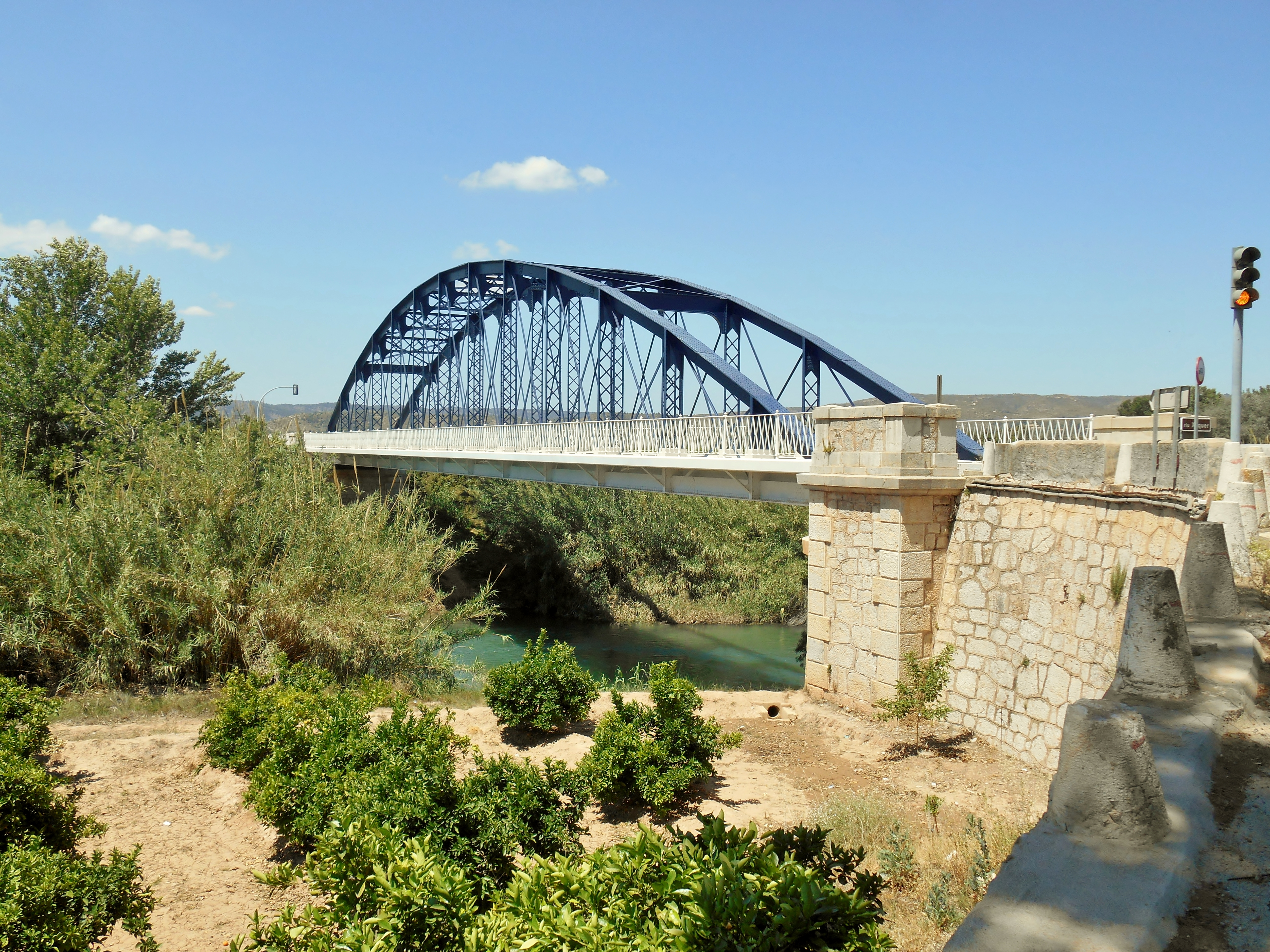 Pont de ferro entre Gavarda i Beneixida.